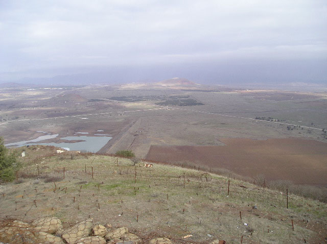 Panorama z Bental w kierunku Doliny Łez - Zima 2004. Fot. Abraham